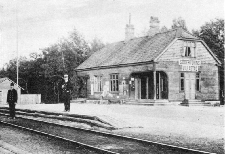 Nynäsbanans station "Södertörns villastad" (idag Farsta strand)